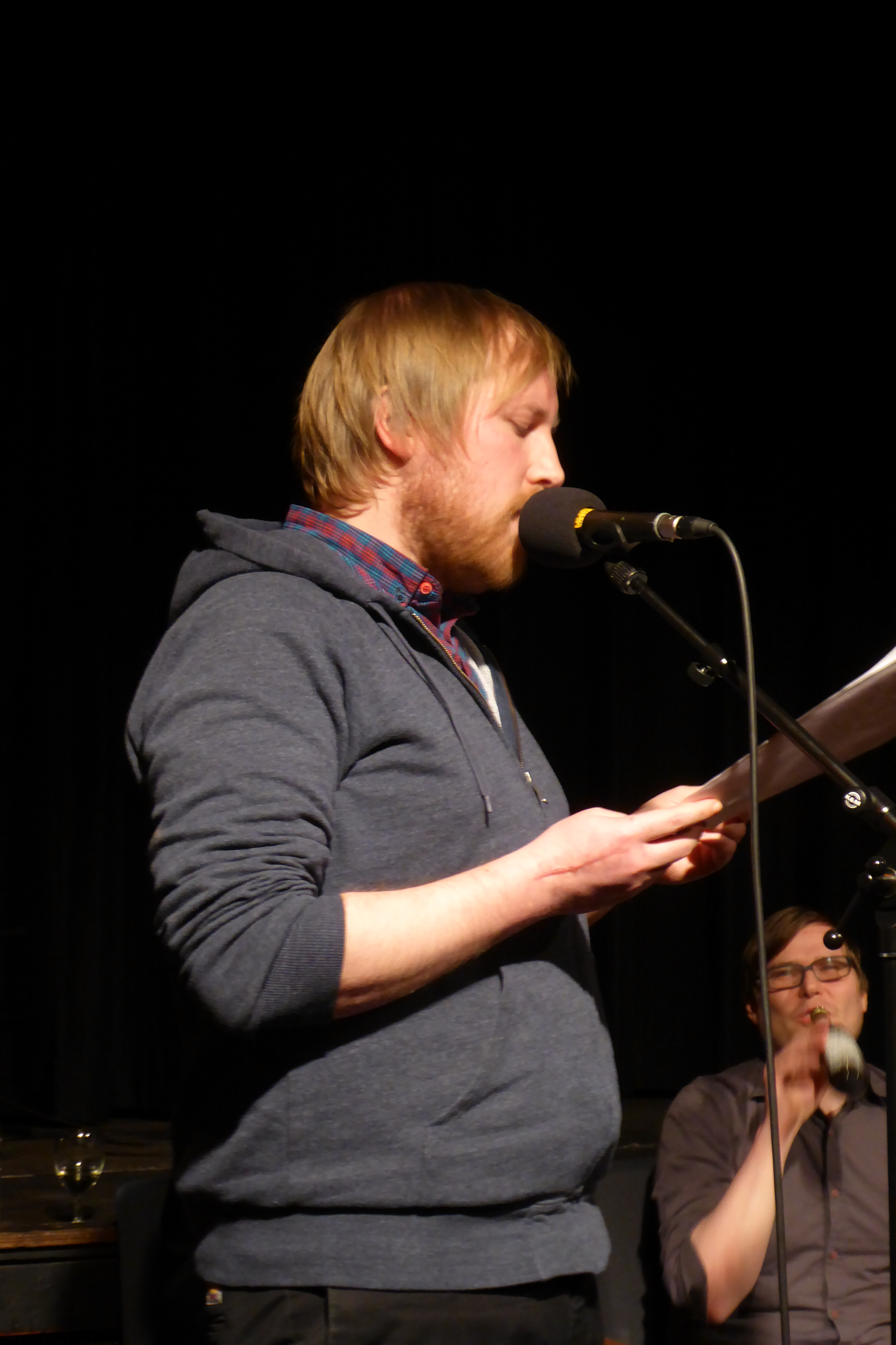 Autor Julius Fischer